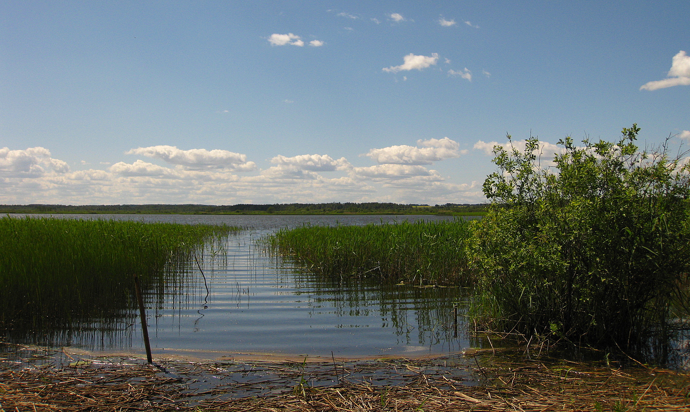 Keeri järve idakaldal, Keeri-Karijärve LKA